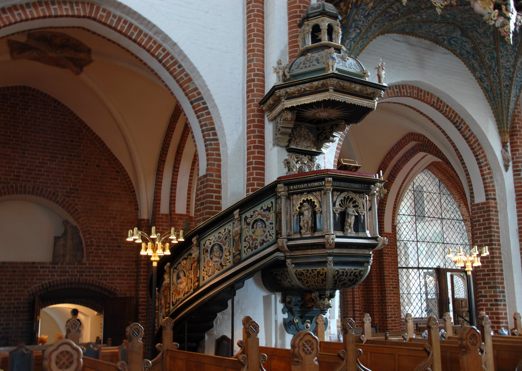 Zandstenen kansel uit 1609 Sandstone pulpit from 1609